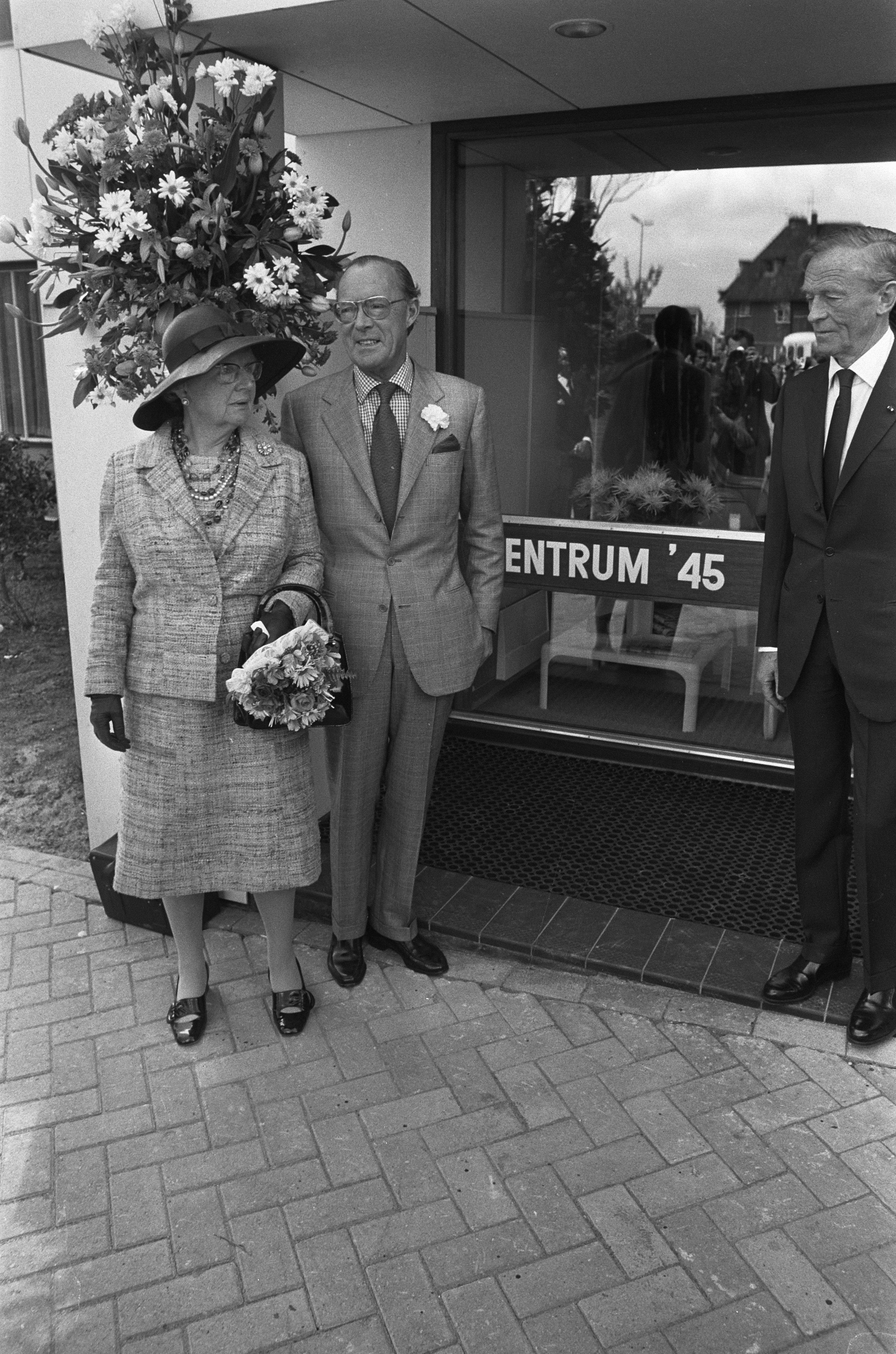 Collectie / Archief : Fotocollectie Anefo Reportage / Serie : [ onbekend ] Beschrijving : koningin Juliana en prins Bernhard bij opening Centrum 45 te Oegstgeest Datum : 16 mei 1973 Locatie : Oegstgeest Trefwoorden : Openingen, koninginnen Persoonsnaam : Bernhard, prins, Juliana (koningin Nederland) Fotograaf : Verhoeff, Bert / Anefo Auteursrechthebbende : Nationaal Archief Materiaalsoort : Negatief (zwart/wit) Nummer archiefinventaris : bekijk toegang 2.24.01.05 Bestanddeelnummer : 926-4130